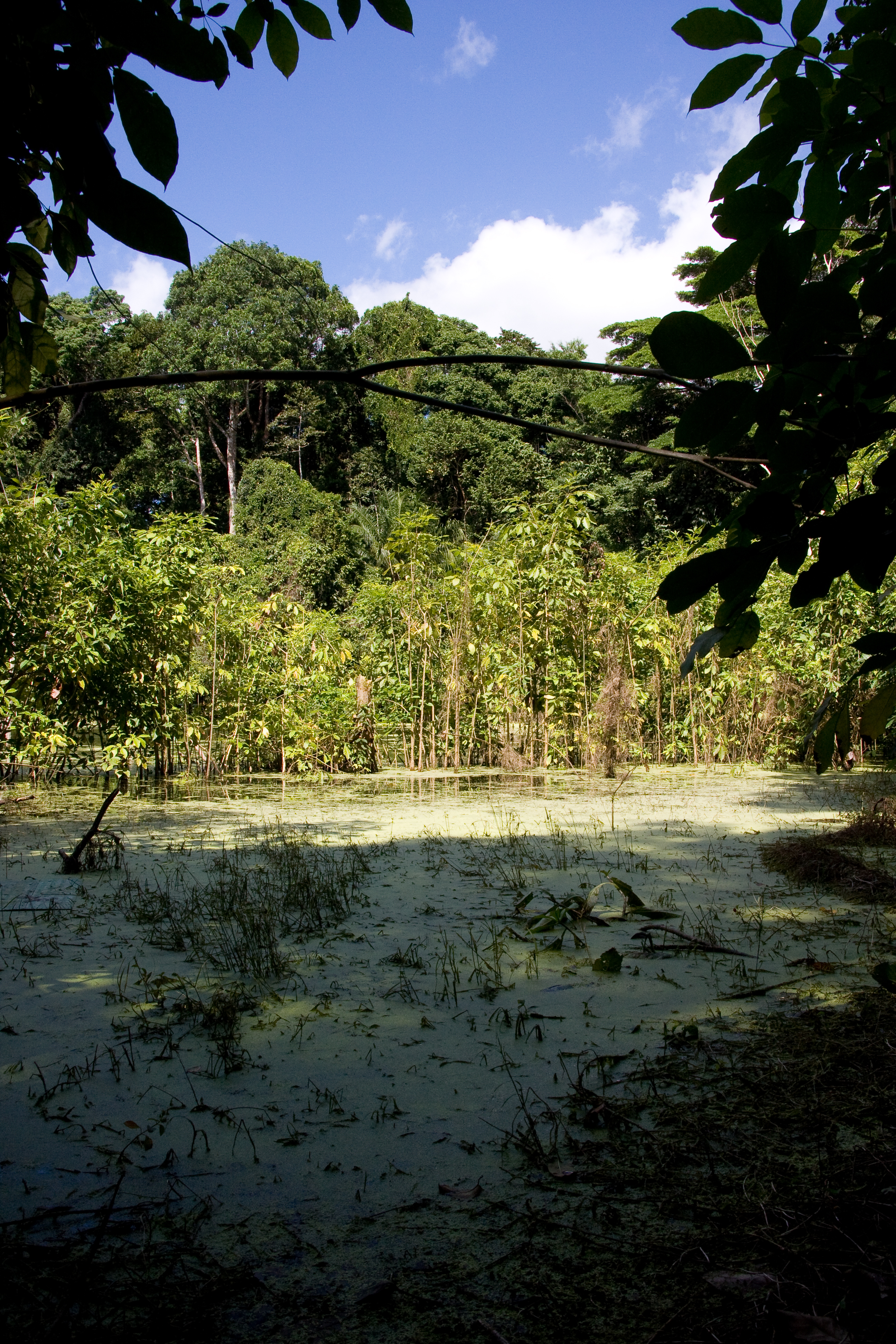 Réserve forestière de Ngezi sur l'île de Pemba en Tanzanie